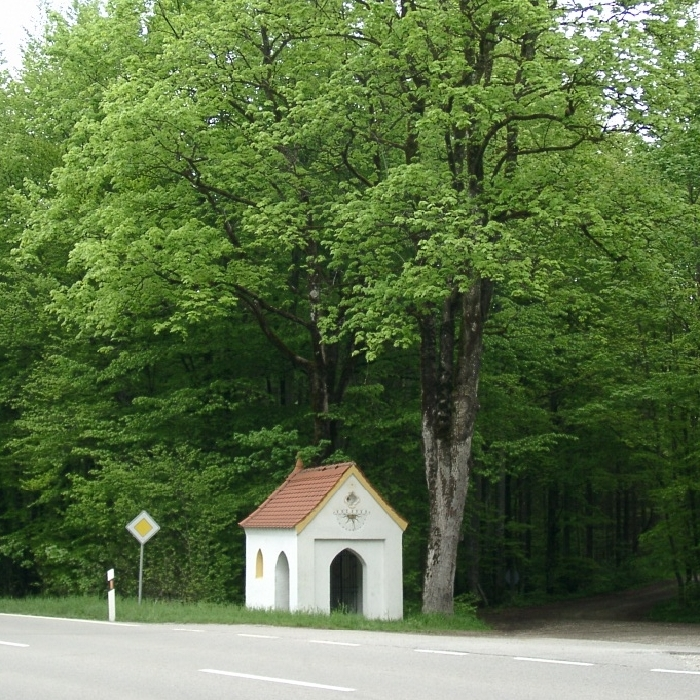 Hubertuskapelle inmitten des Ebersberger Forstes